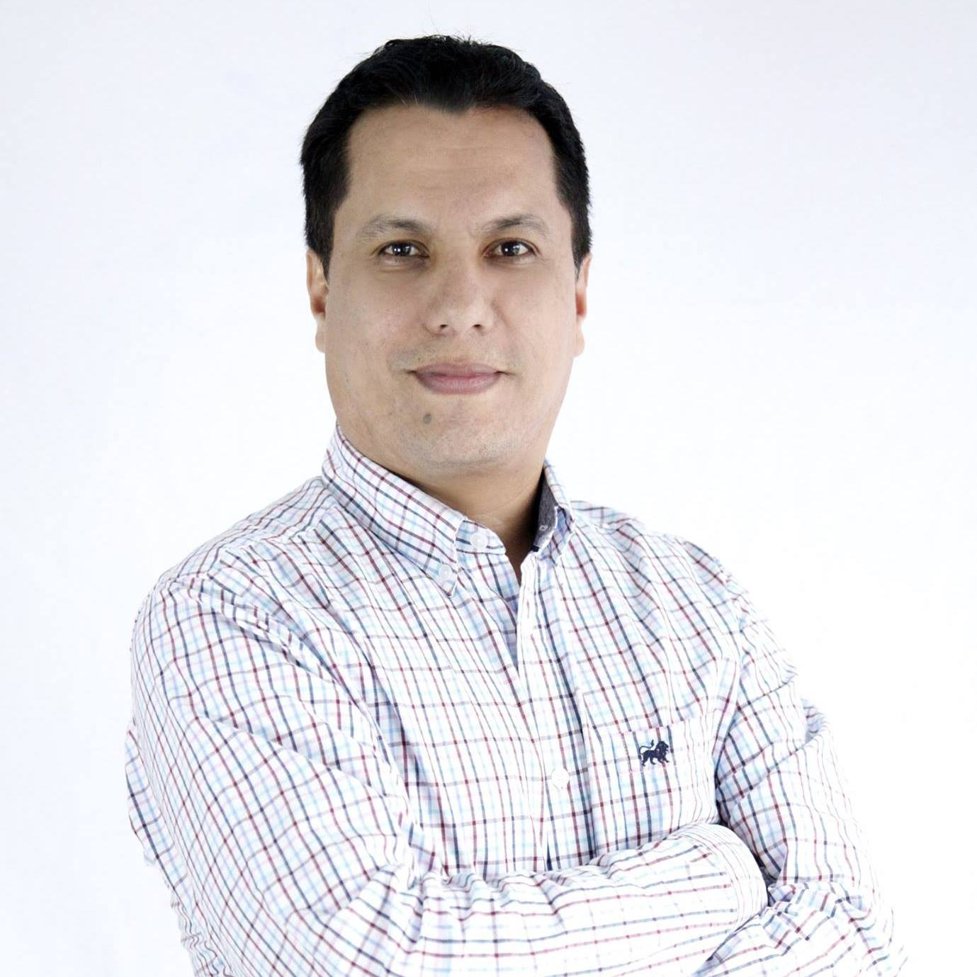 Actualización de fotografía